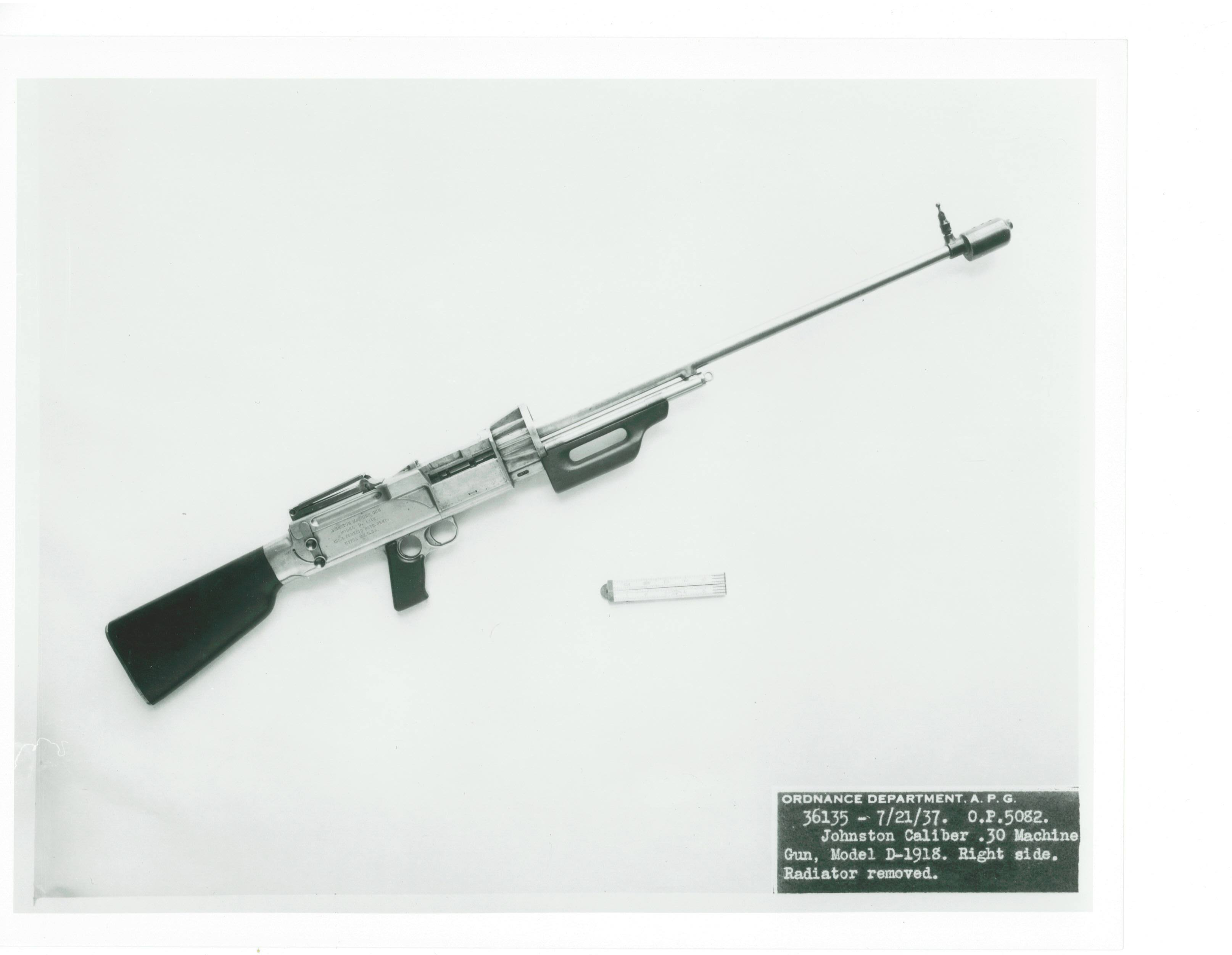 Johnston Model D1918 machine gun